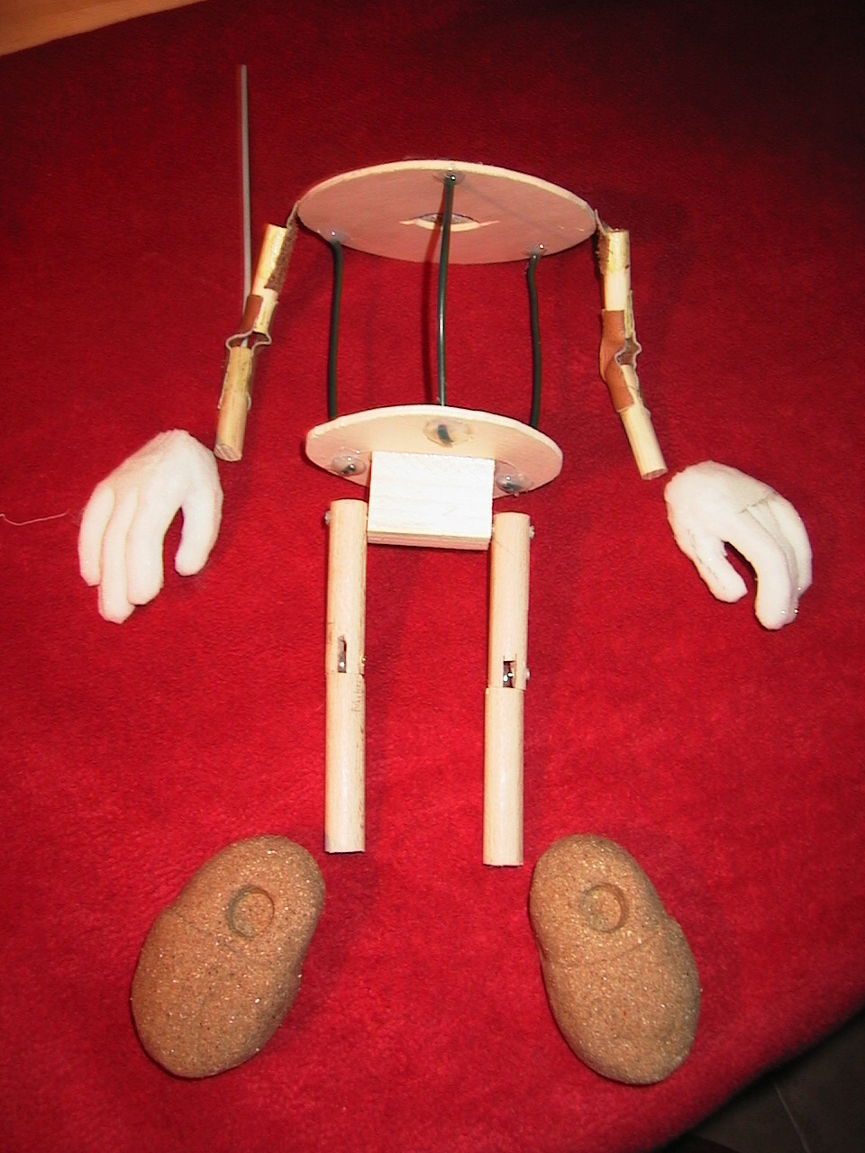 Einfache Tischfigur im Bauzustand (Figurentheater Winter, Eine Hand voll Drachenfeuer)